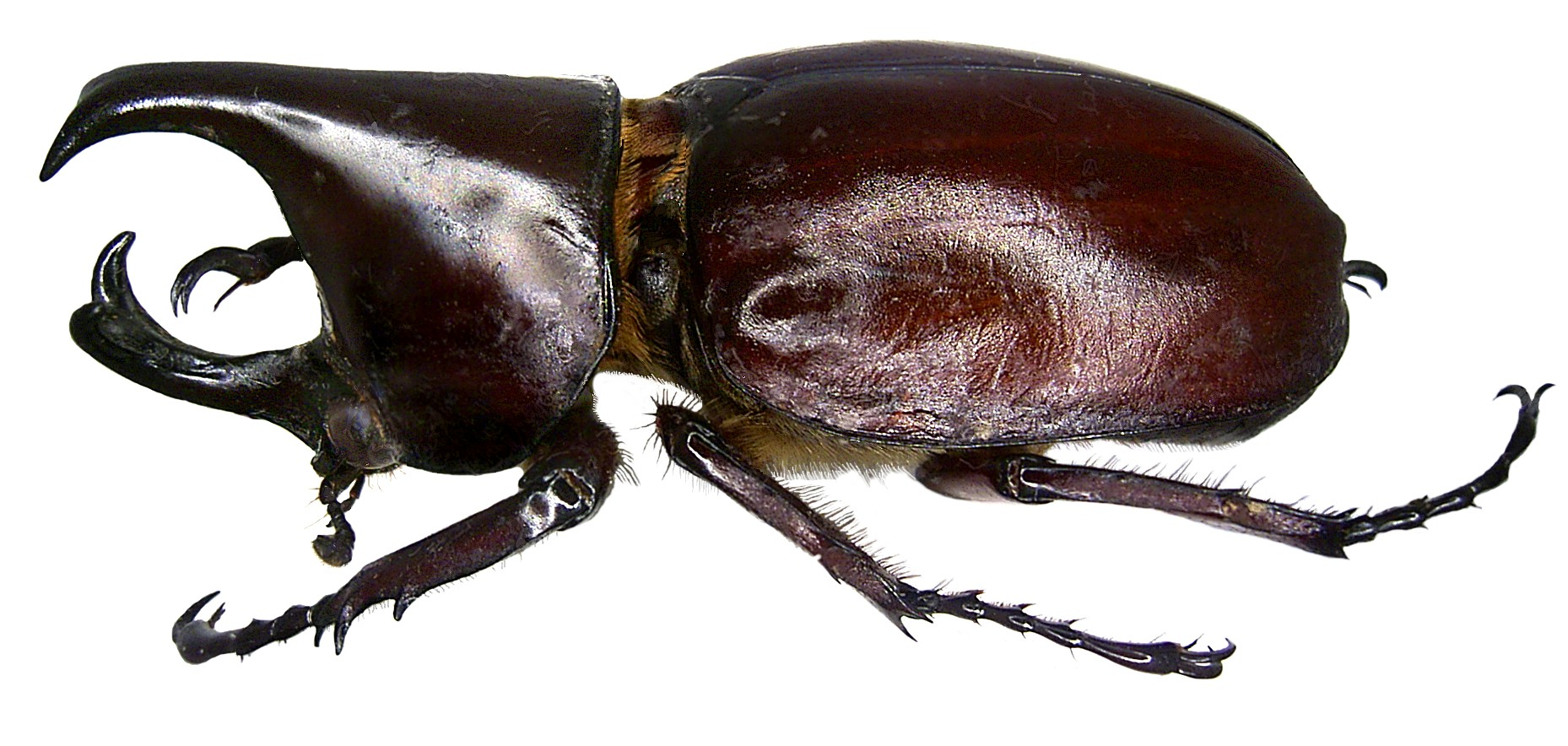 Xylotrupes socrates Familie: Scarabaeidae Grösse: 43 mm Fundort: Thailand, Khao Lak leg. U.Schmidt, 2007, det. F. Vitali, 2017 Foto: U.Schmidt, 2007